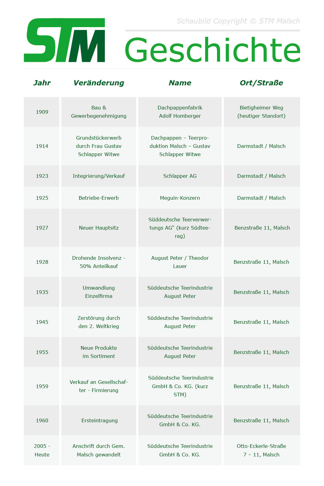 Zeittafel der Süddeutschen Teerindustrie STM Malsch